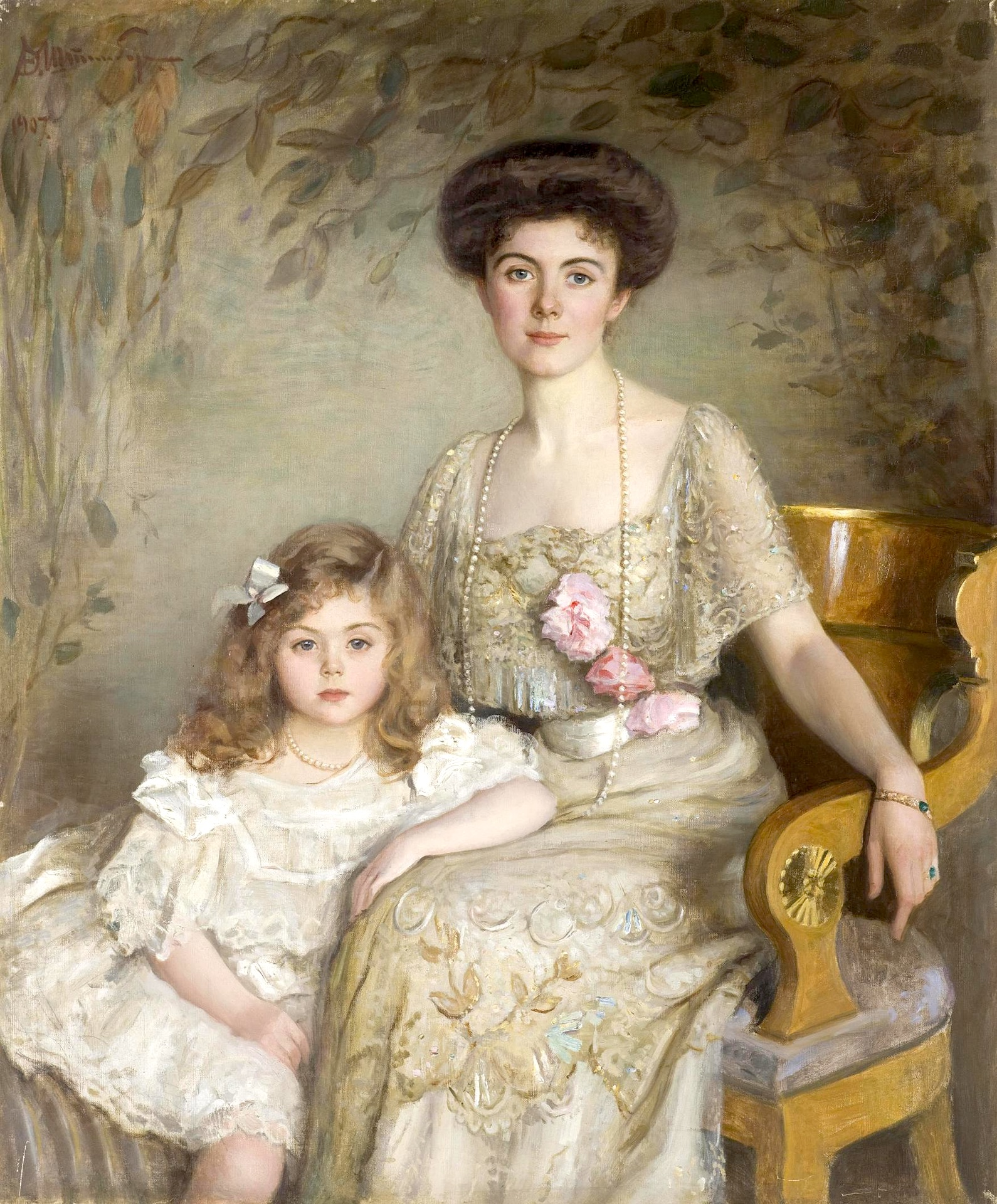 Александра Васильевна Балашова, ур. графиня Гендрикова (1882/84-1919), фрейлина, замужем за Андреем Николаевичем Балашовым (1874-1916), изображена с дочерью Софьей (1901- ?).